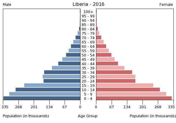 A population pyramid illustrates the age and sex structure of a country's population and may provide insights about political and social stability, as well as economic development. The population is distributed along the horizontal axis, with males shown on the left and females on the right. The male and female populations are broken down into 5-year age groups represented as horizontal bars along the vertical axis, with the youngest age groups at the bottom and the oldest at the top. The shape of the population pyramid gradually evolves over time based on fertility, mortality, and international migration trends.